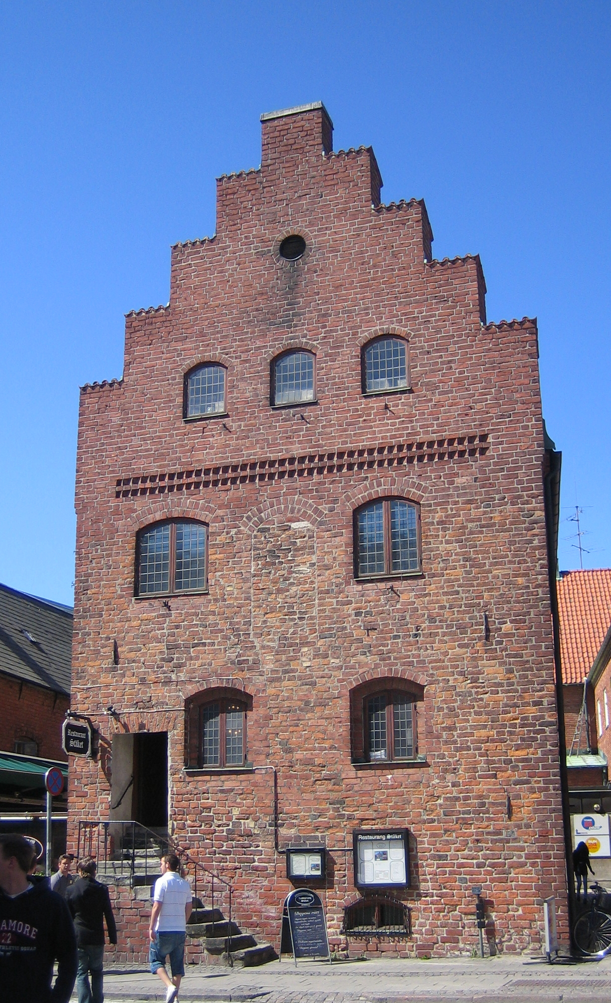 Stäket, medieval building in Lund